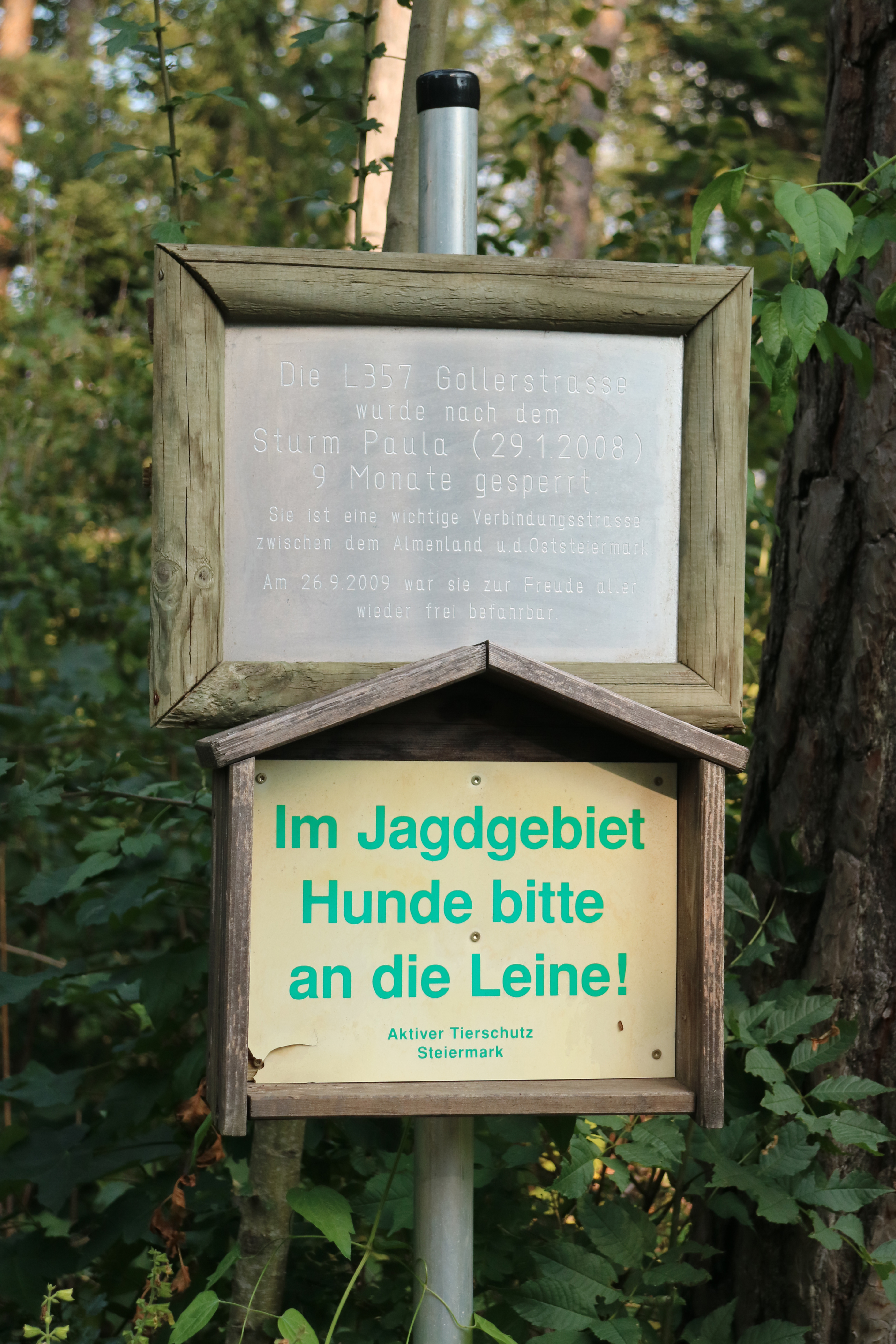 Informationstafel am Gollersattel, Gemeinde Gutenberg-Stenzengreith, Steiermark